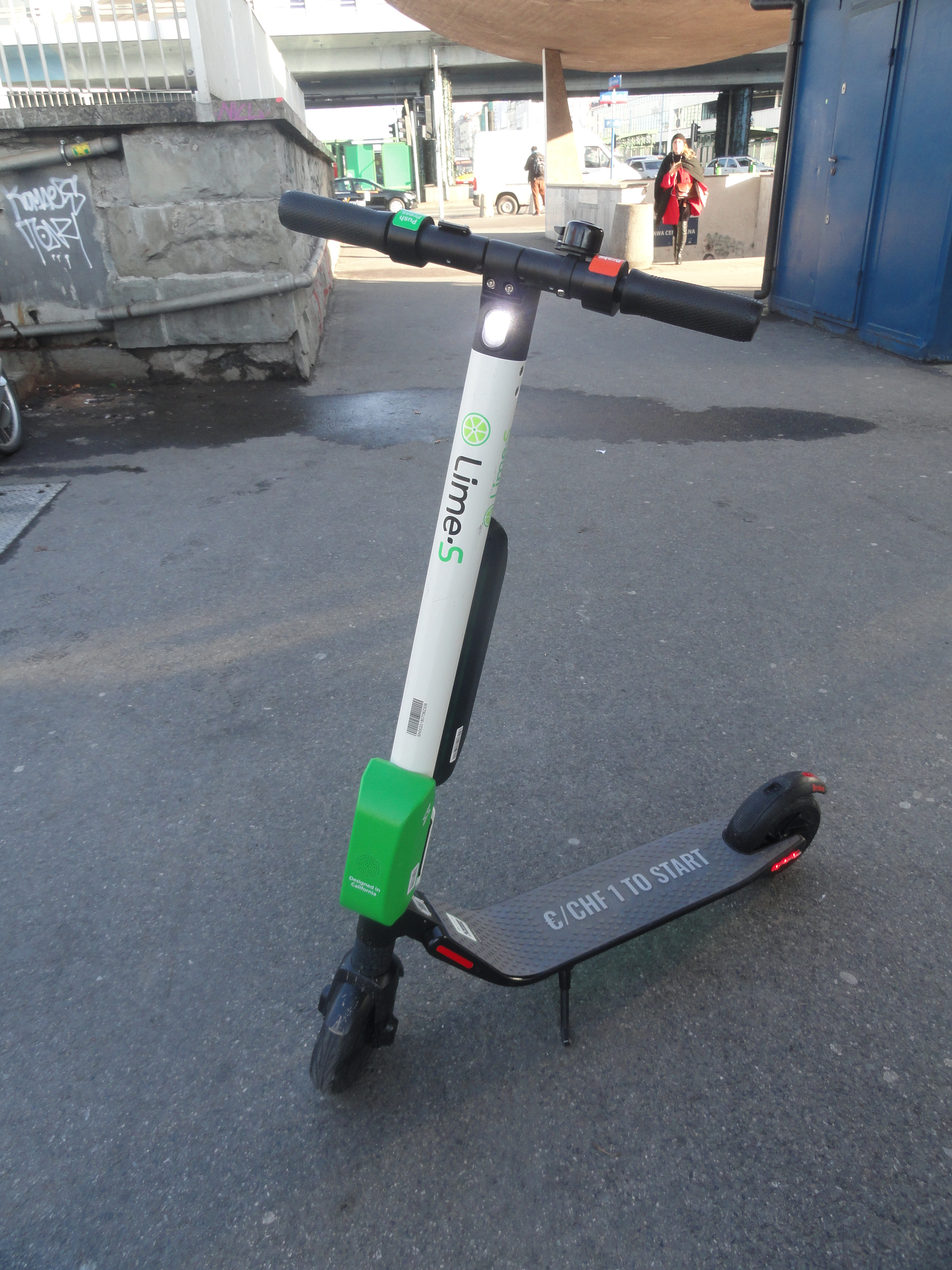 Hulajnoga elektryczna Lime przy Alejach Jerozolimskich niedaleko Dworca Centralnego w Warszawie.